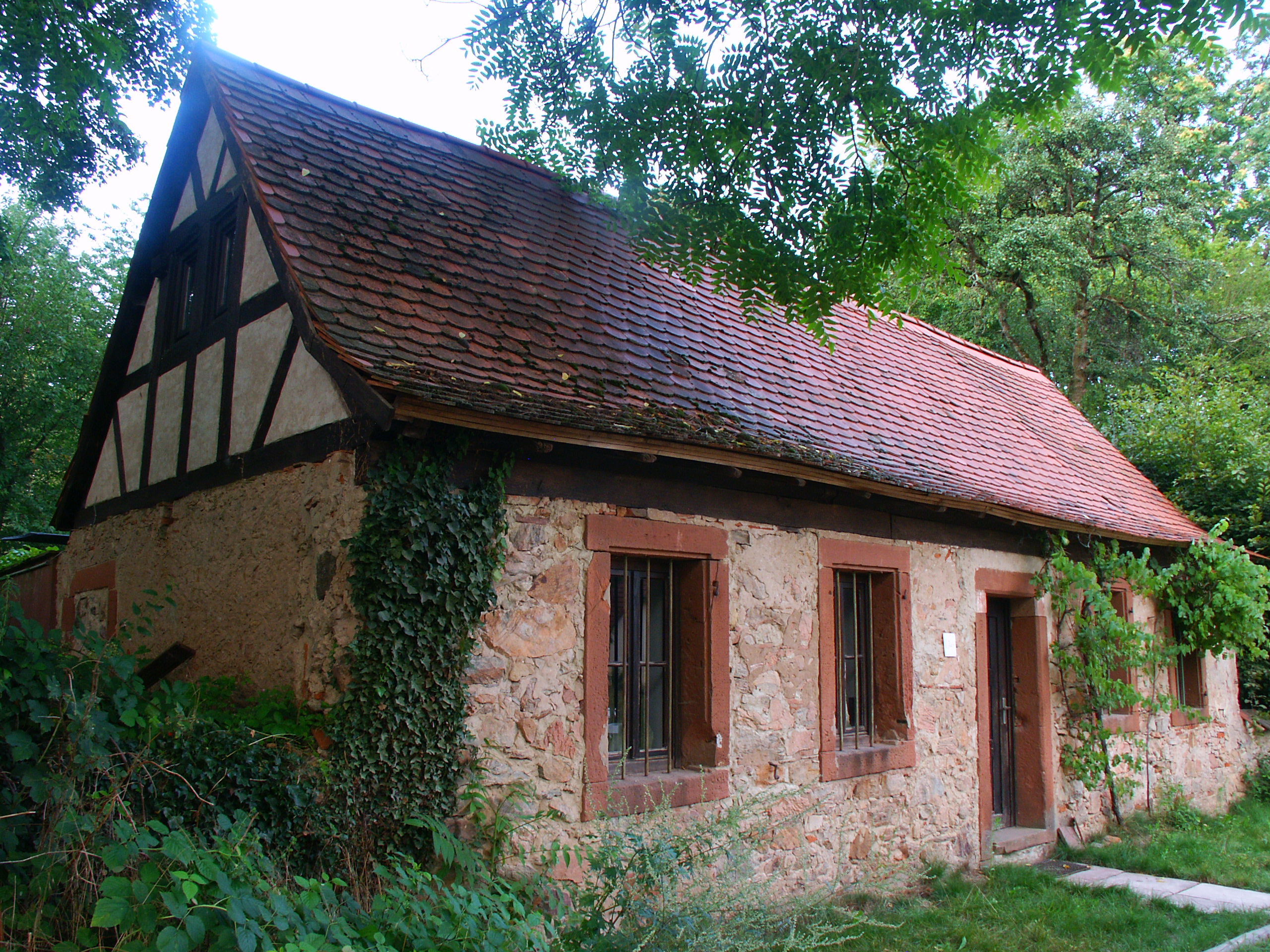 Karoline-von-Günderrode-Haus im Hof Trages bei Freigericht-Somborn/Hessen